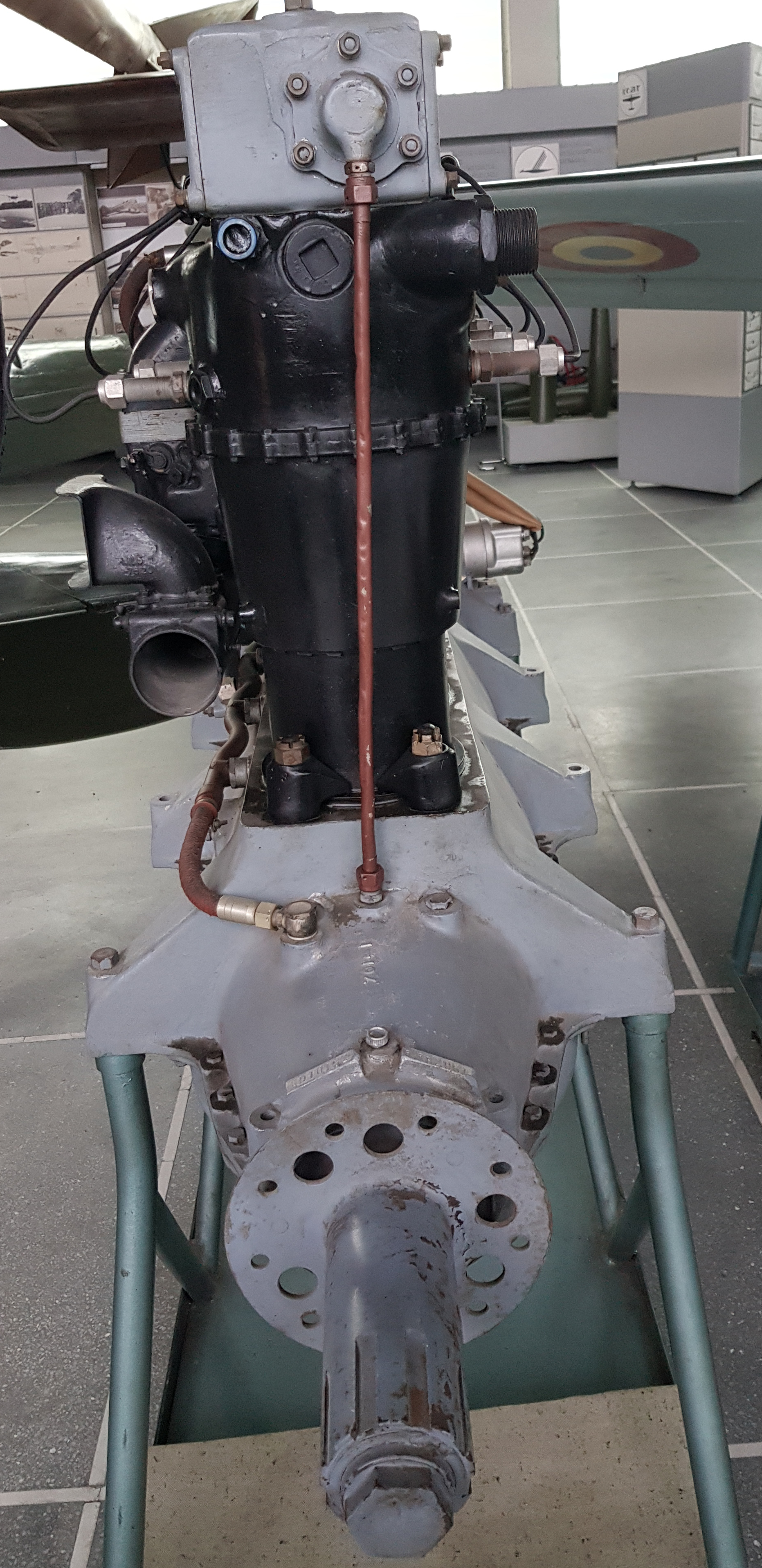 Siddeley Puma-Flugzeugmotor. Hergestellt 1917/8, im Militärmuseum Bukarest.